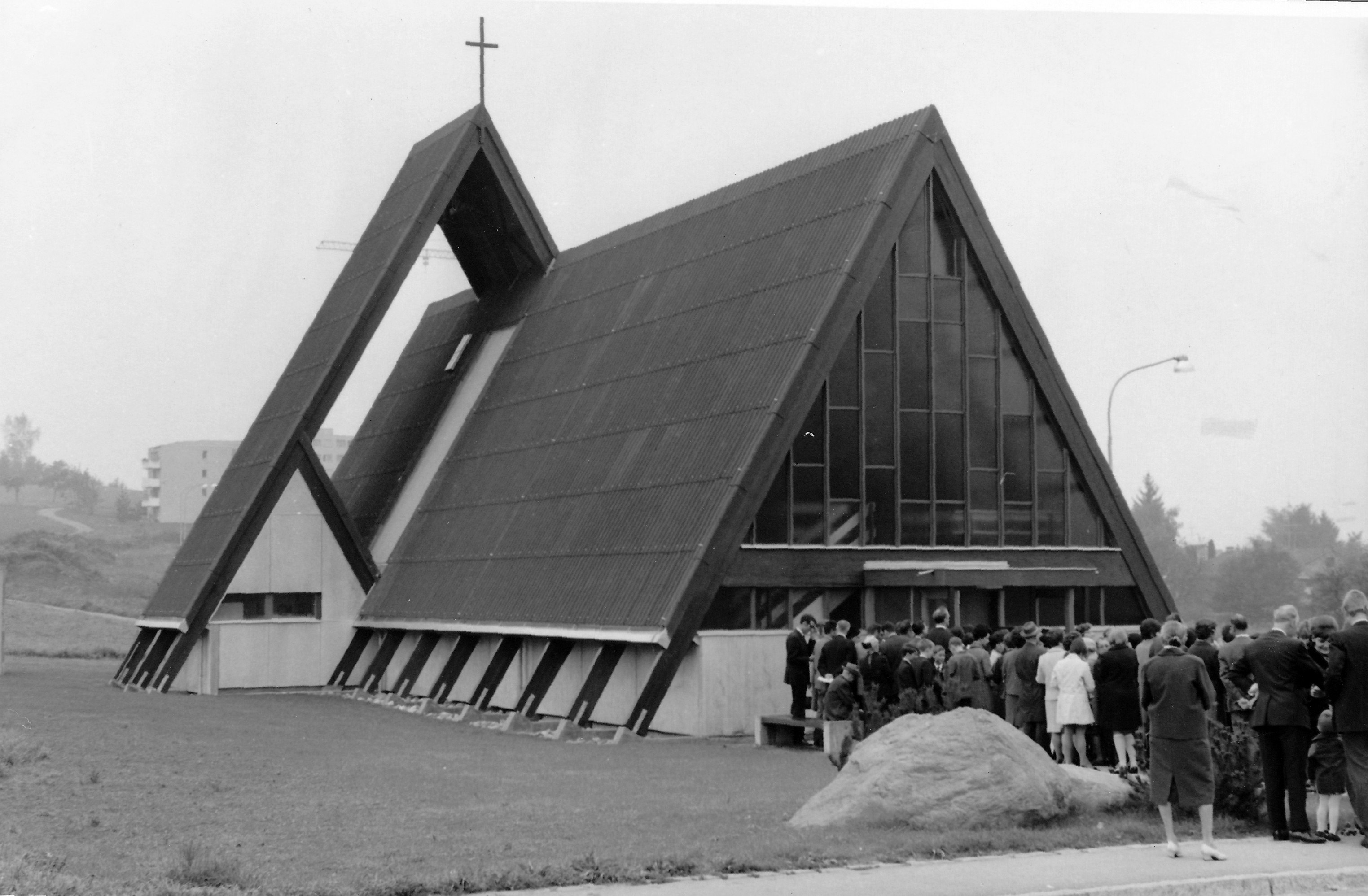 Römisch-katholische Pfarrei Heilig Kreuz Zürich-Altstetten, Tituskirche im Suteracher